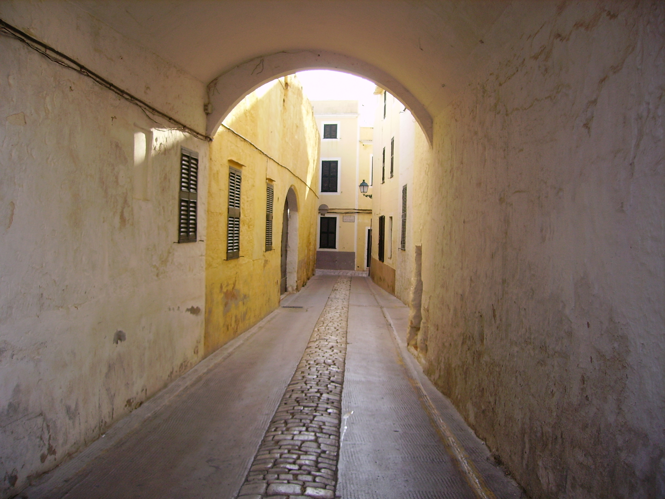 Carrer de Ciutadella de Menorca, Illes Balears.